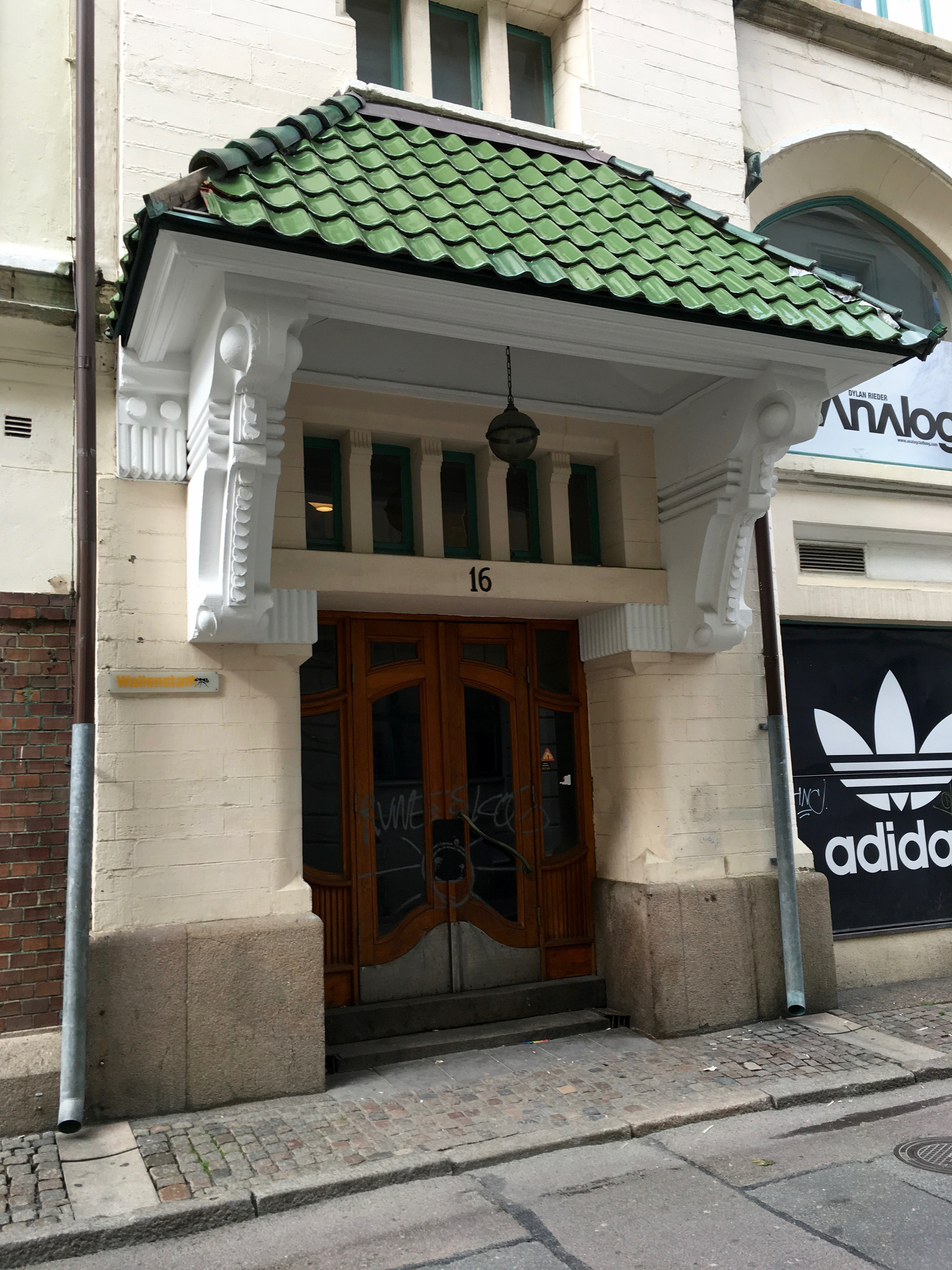 Portalen vid Kronhusgatan 16. Huset vid Kronhusgatan 14-16 och Östra Hamngatan 15 i Göteborg ritades av Hjalmar Zetterström och byggdes 1906.